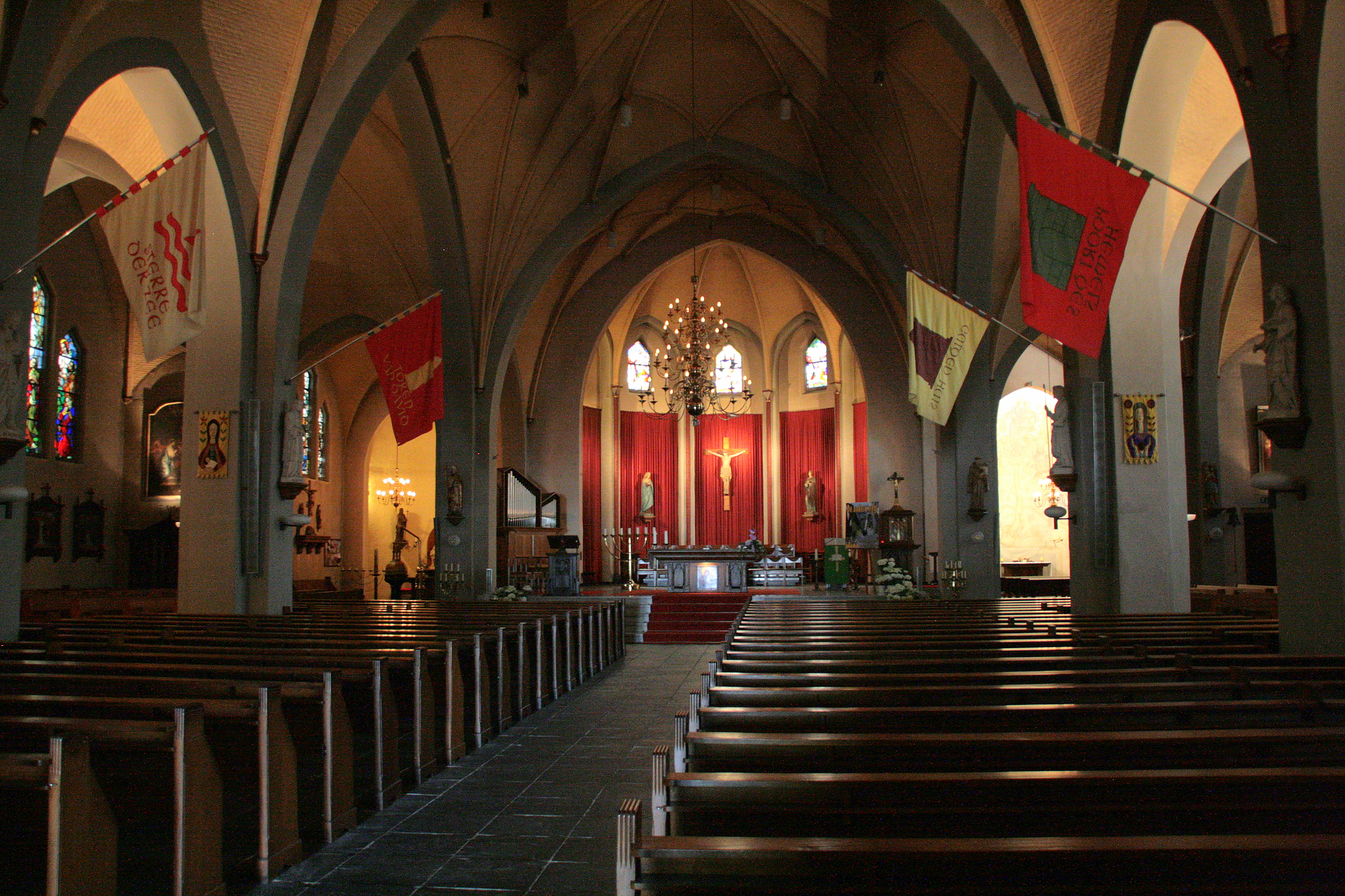 In het sobere, gepleisterde en geschilderde interieur spitsbogige arcades tussen pijlers met lisenen. In het schip, transept en koor netgewelven, in de zijbeuken en kapellen graatgewelven.